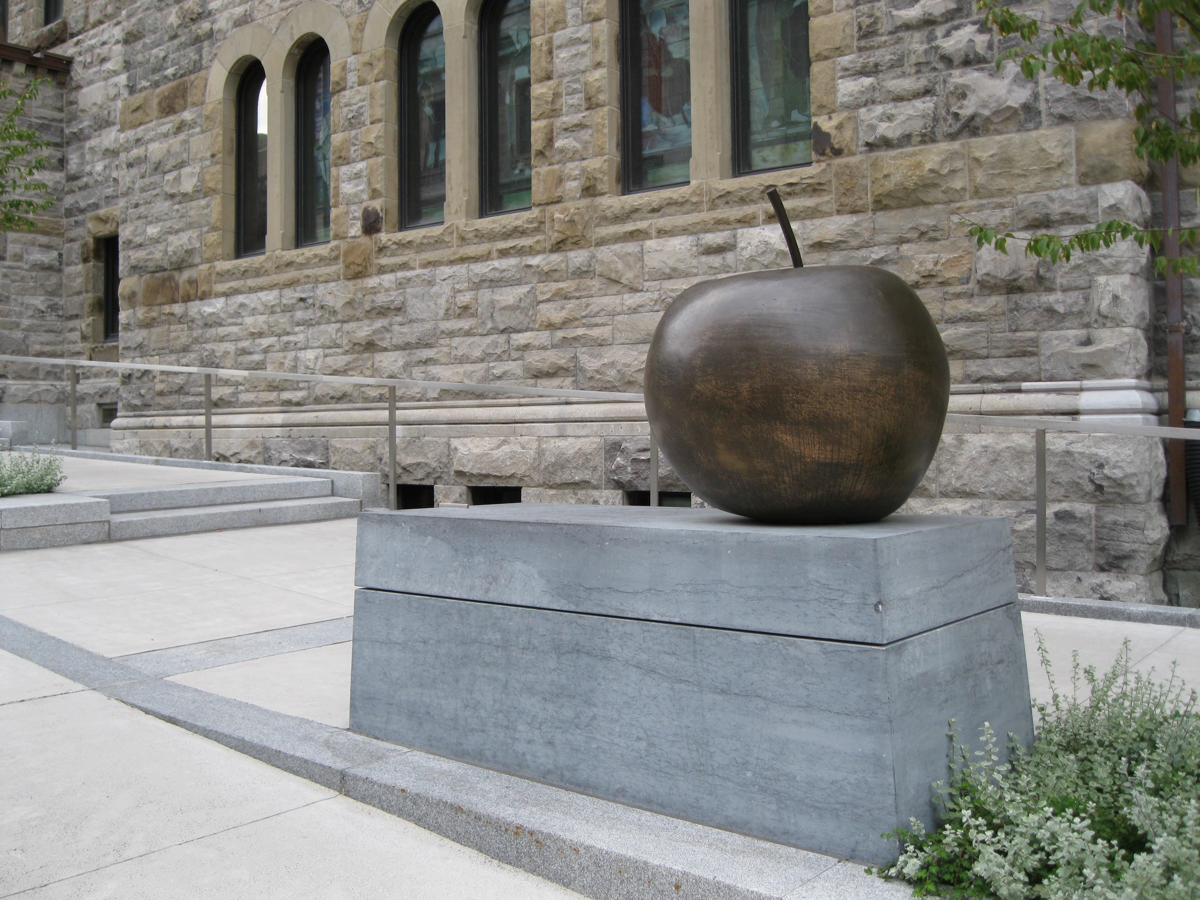 Pomme de Londres (2007), par Claude Lalanne, Musée des beaux-arts de Montréal